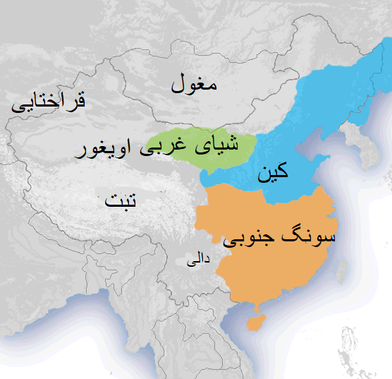 سلسله کین و سلسله سونگ در سال 1141 میلادی